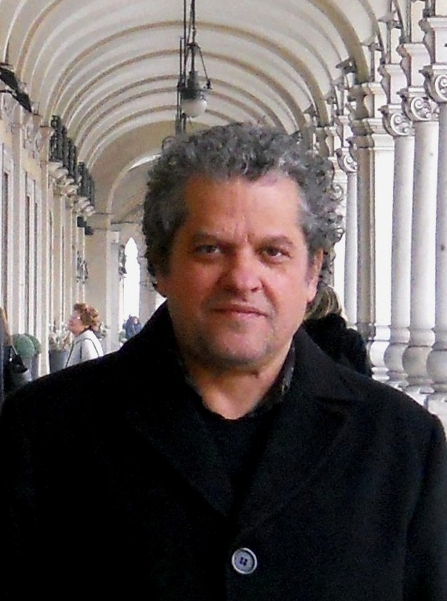 Carlo Ruta